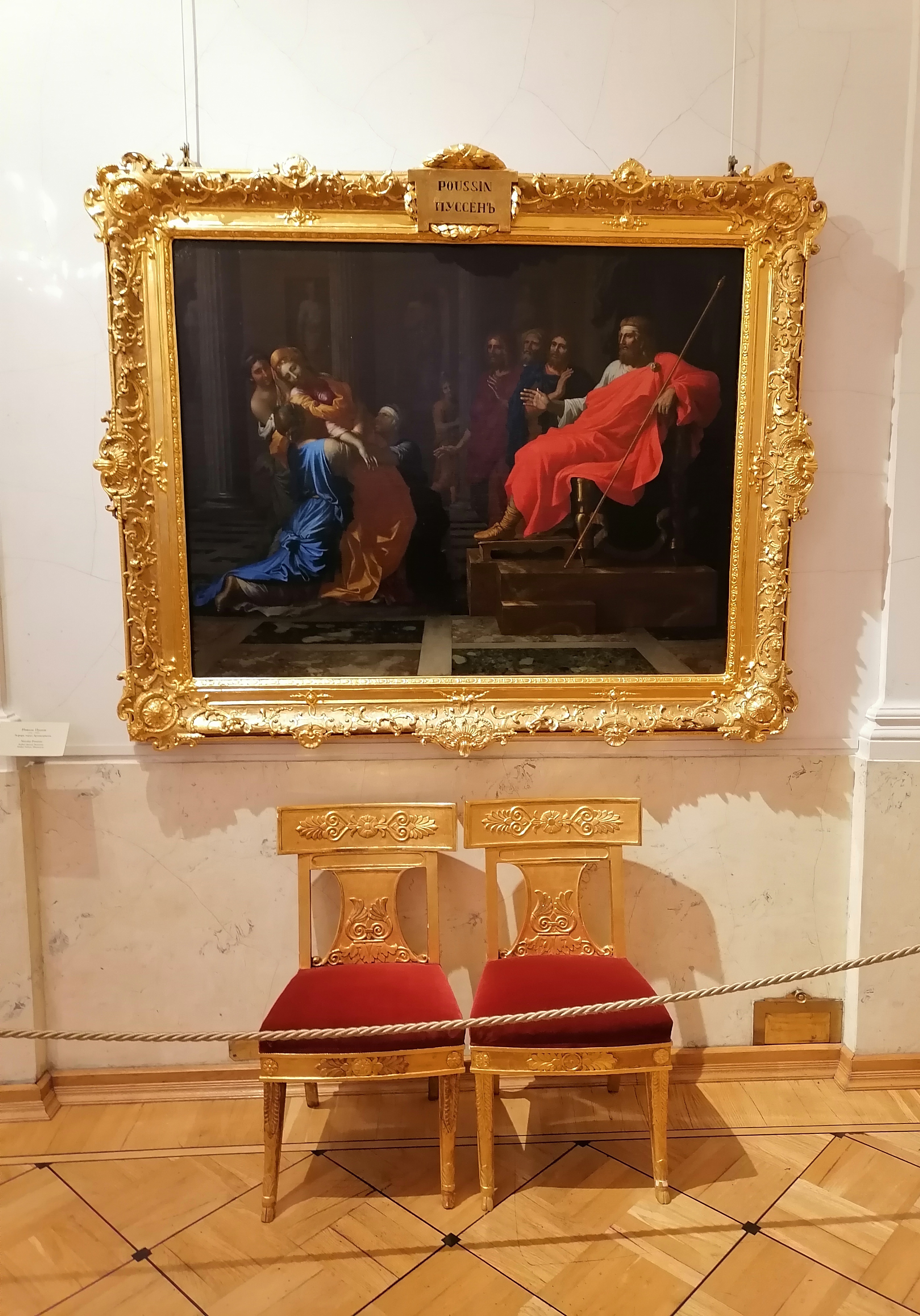 Зимний дворец - зал 279